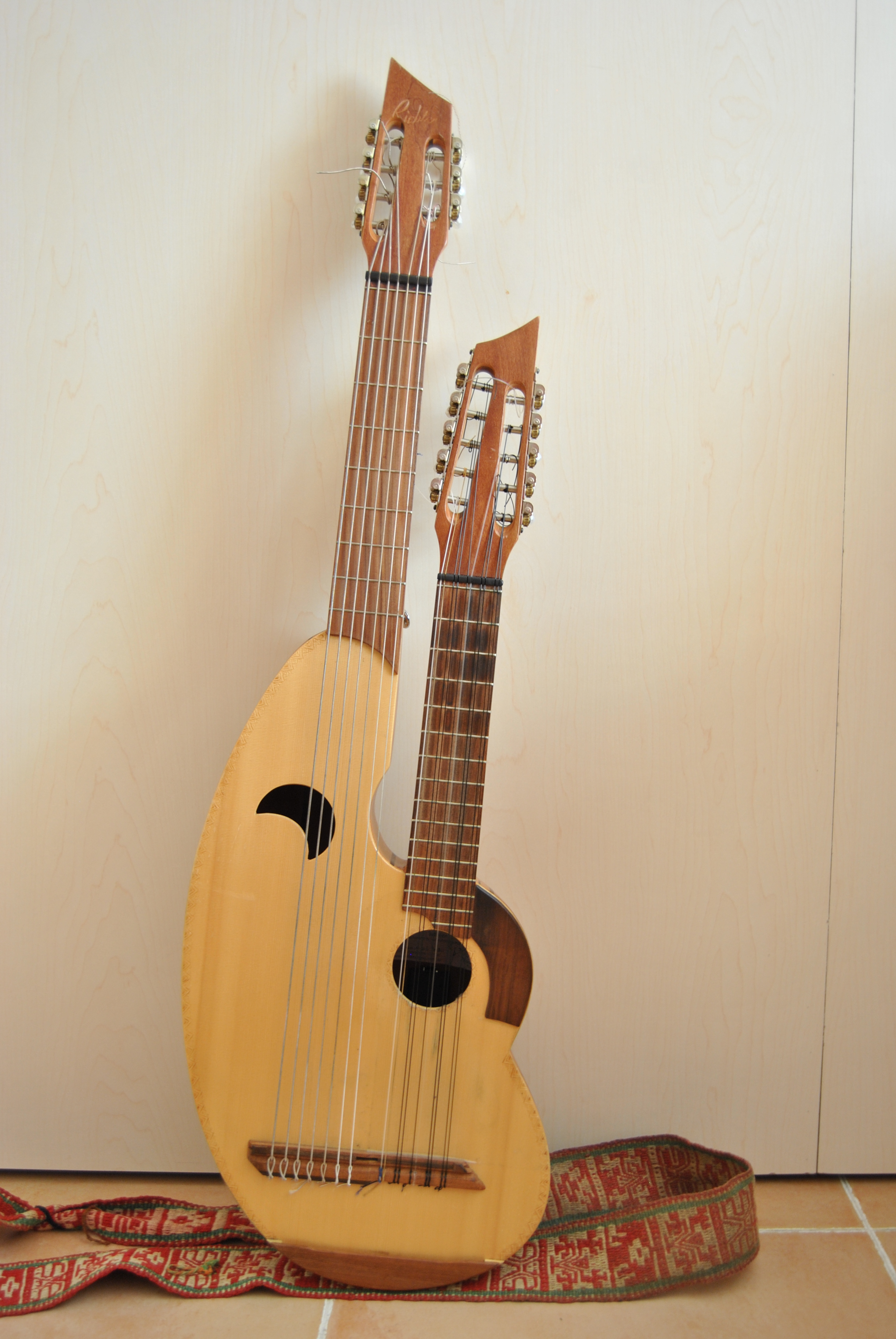 Kanatl instrumento creado por el musico Pablo Nahual "Creador del Kanatl, instrumento de cuerda resultado de la fusión del ronroco y de la guitarra, que utiliza durante sus conciertos. La palabra Kanatl significa 'dos eslabones unidos'."— Spanish Wikipedia article "Pablo Nahual"